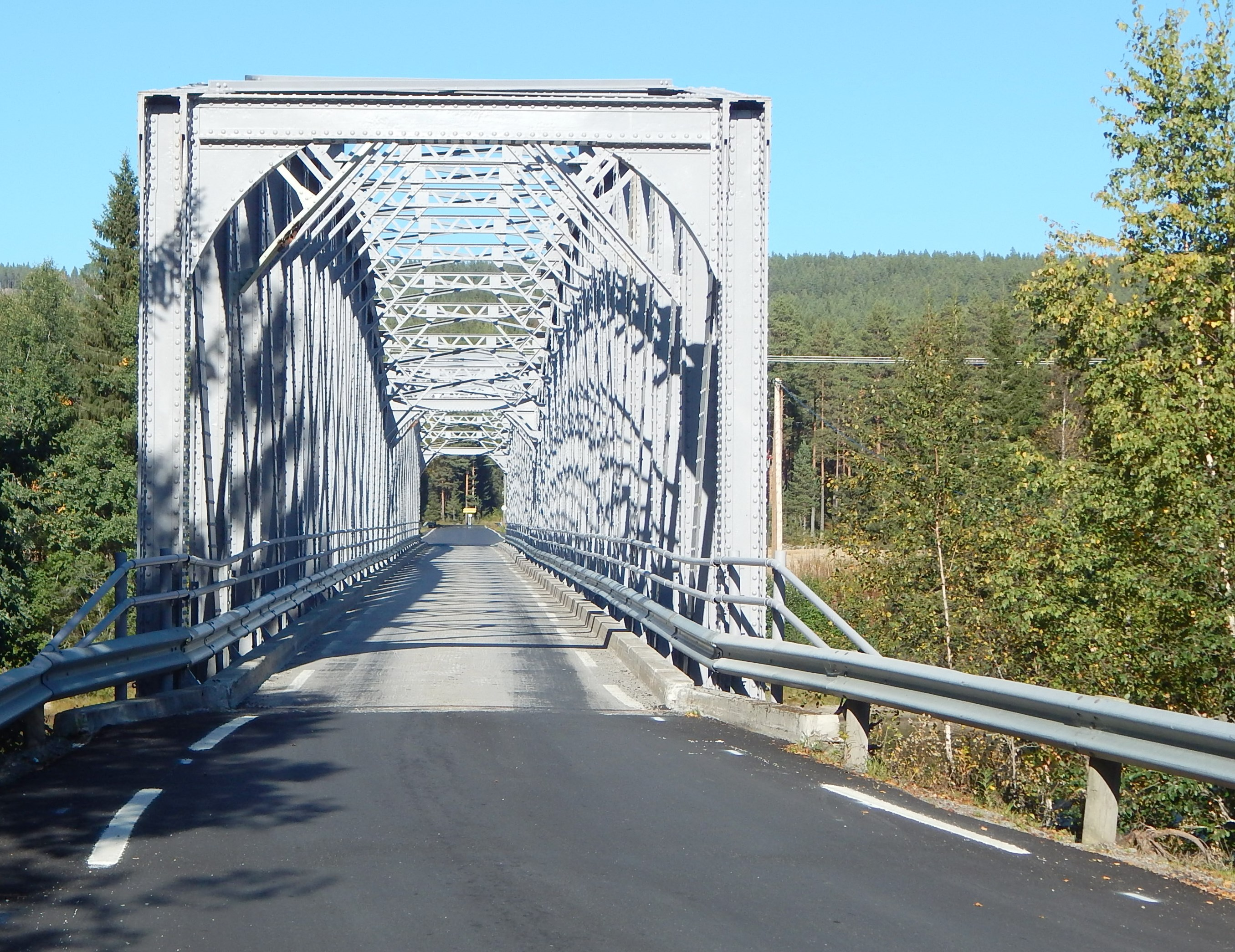 Steinvik bru